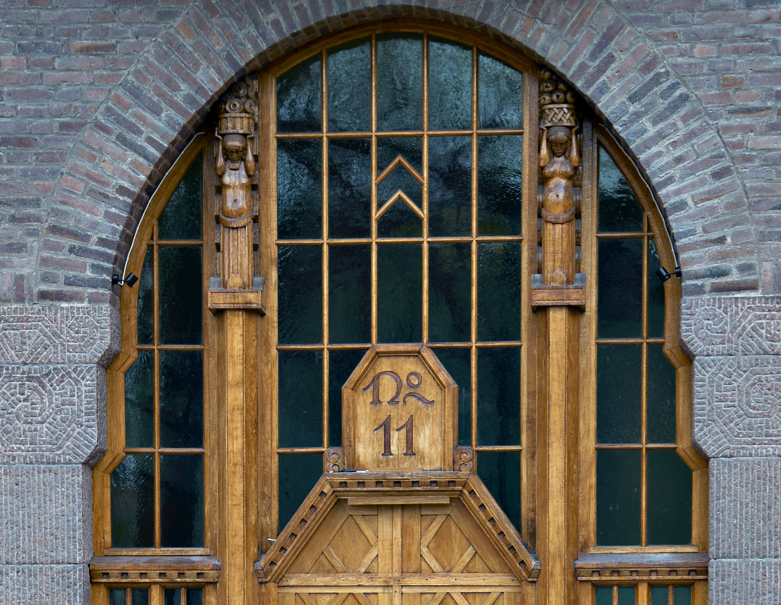 Port Karlavägen 11. Träskulpturerna utförda av arkitekten Gunnar Morssings fru Ise Morssing. (beskuren)